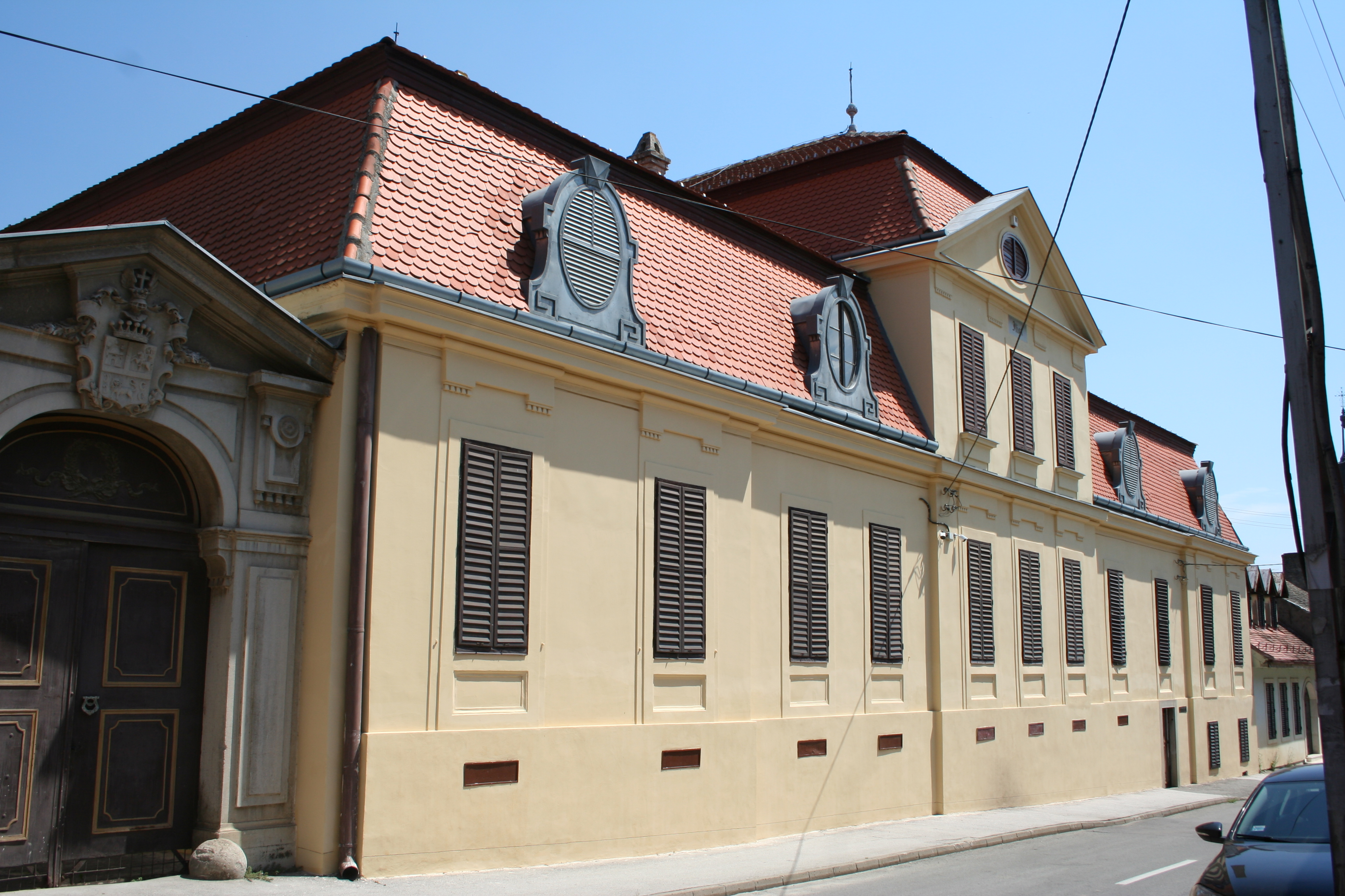 Palata Ilion